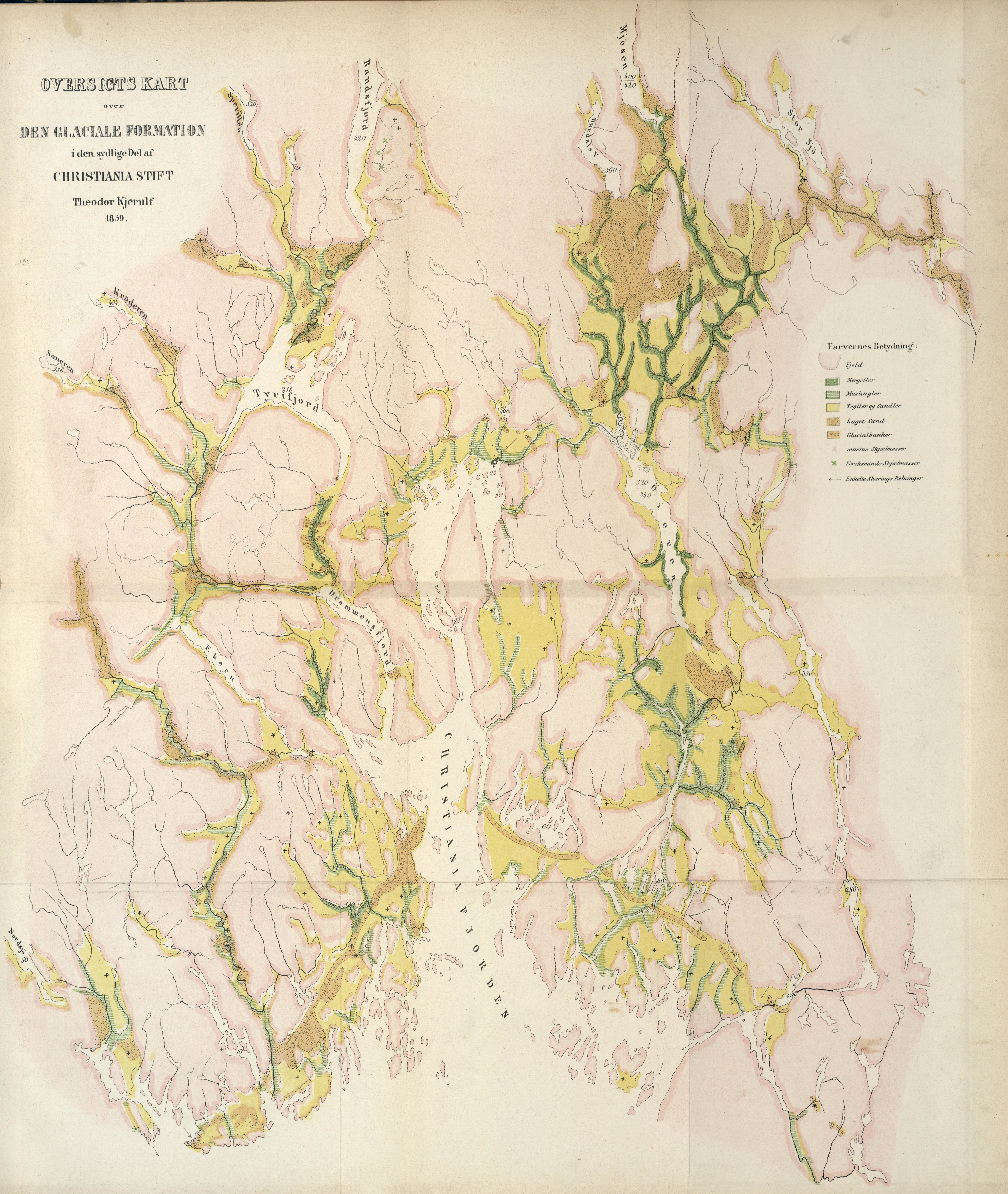 «Oversigtskart over den glaciale Formation i den sydlige Del af Christiania Stift». Kart av Theodor Kjerulf i Theodor Kjerulf/Michael Sars: Iagttagelser over Den postpliocene eller glaciale Formation i en del af det sydlige Norge, 1860